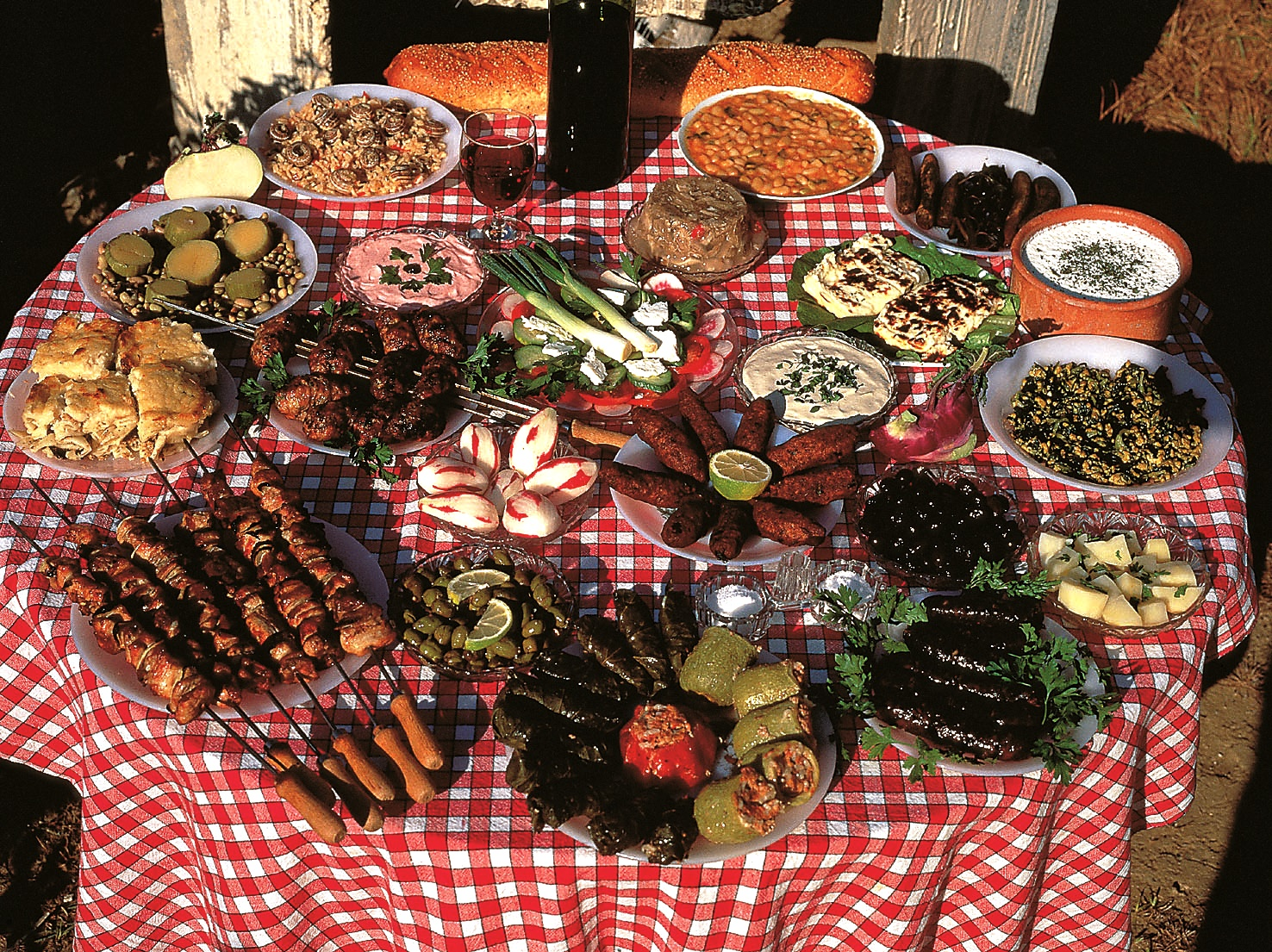 Vin et gastronomie chypriotes